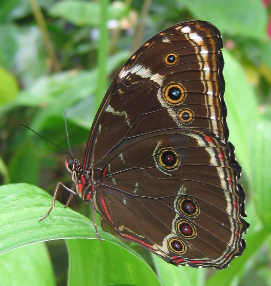 Morpho achilles Botanischer Garten München-Nymphenburg